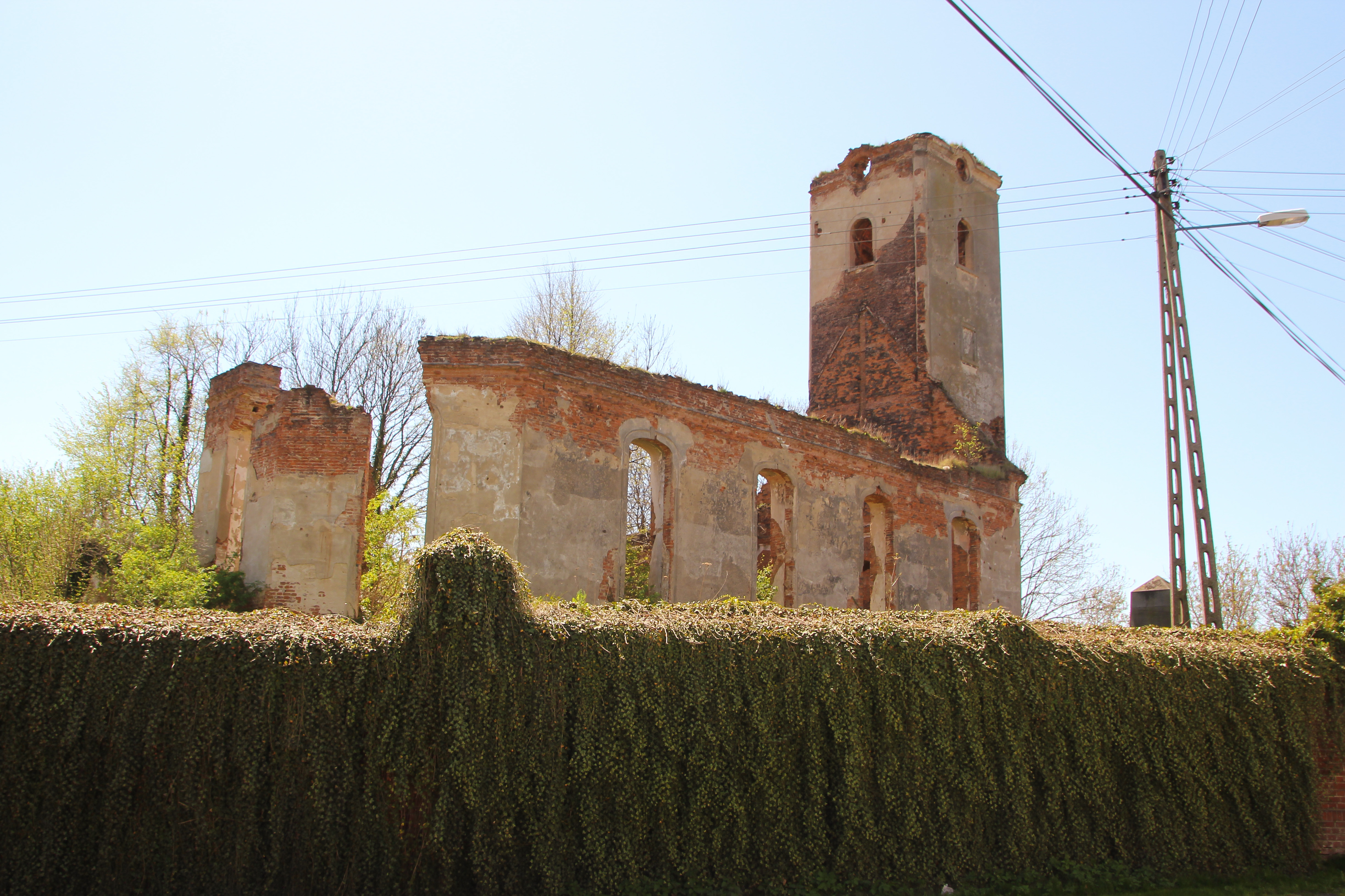 Ruina ewangelickiego kościoła w Rozumicach – ruiny kościoła ewangelickiego, 1804-1807.